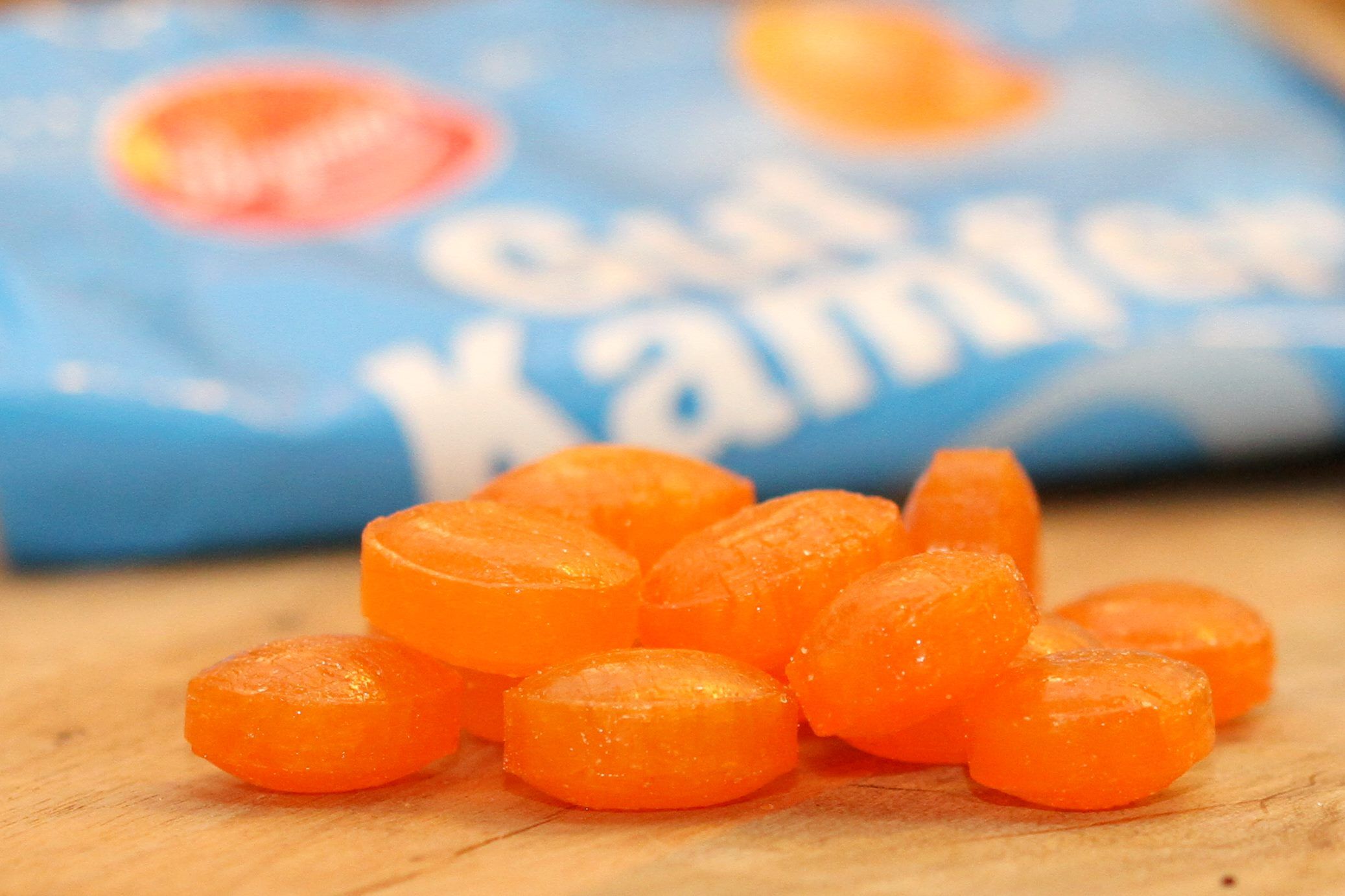 Gul Kamfer fra Brynild